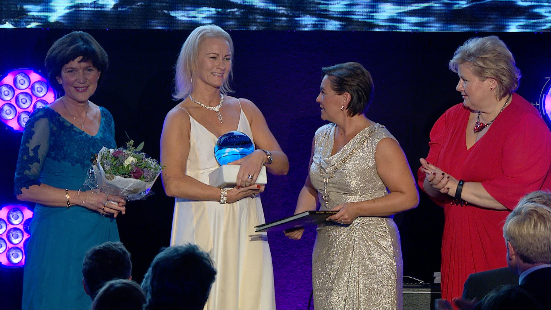 Grieg Gruppen mottar Bærekraftsprisen